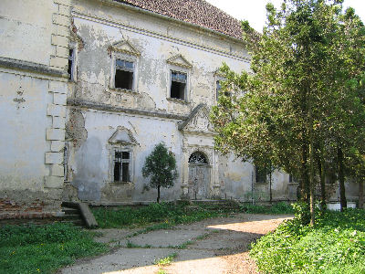 Conacul din Sanmiclaus/Bethlenszentmiklós, Alba